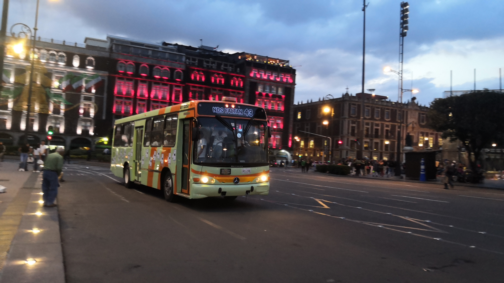 Autobus